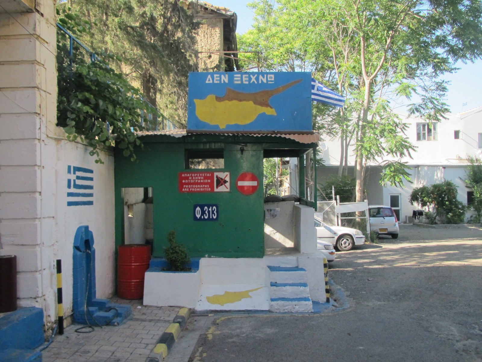 Nicosia by Paride